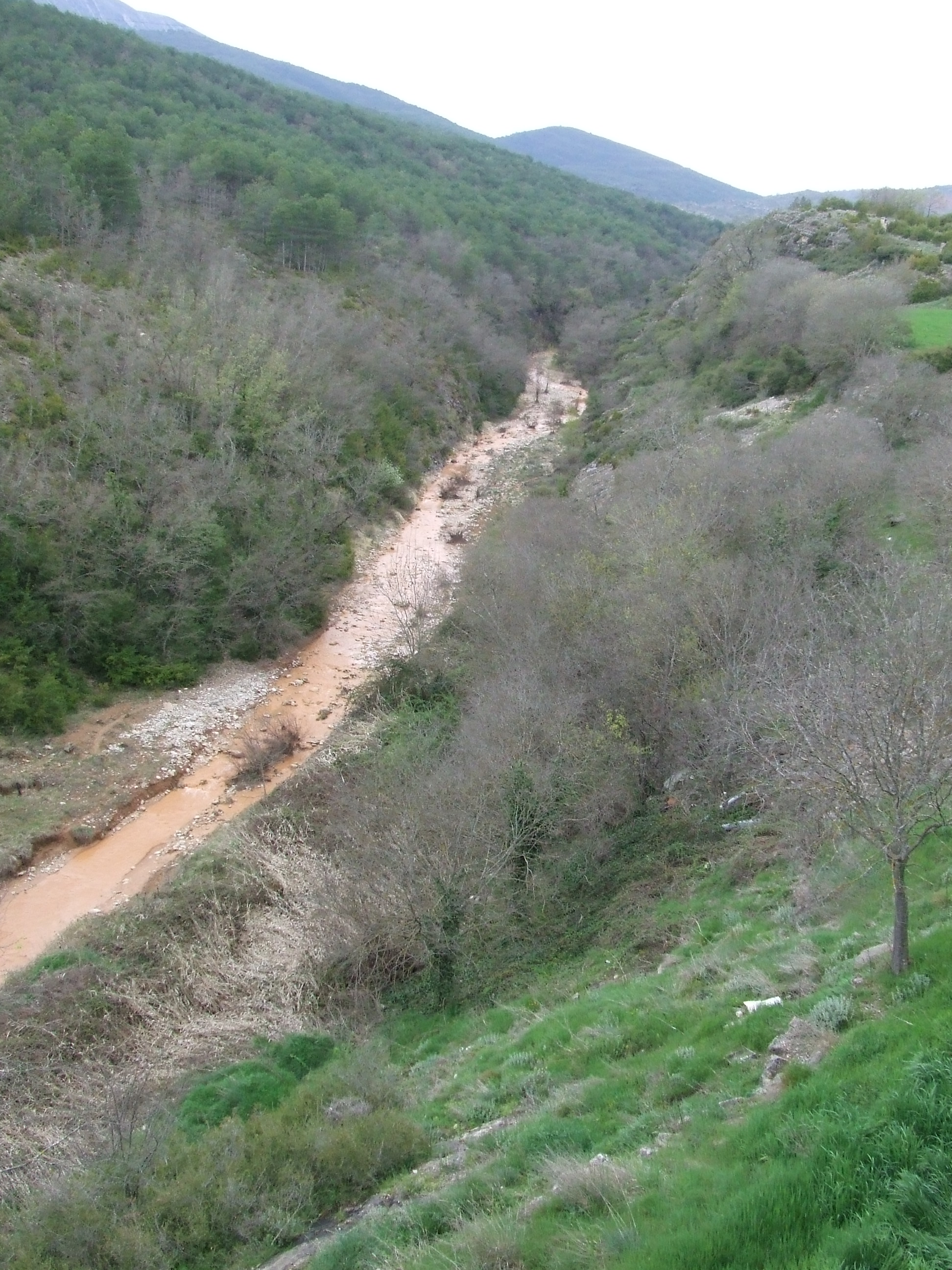 El barranc de Moror sota mateix de Cellers (Guàrdia de Tremp, Castell de Mur, Pallars Jussà)